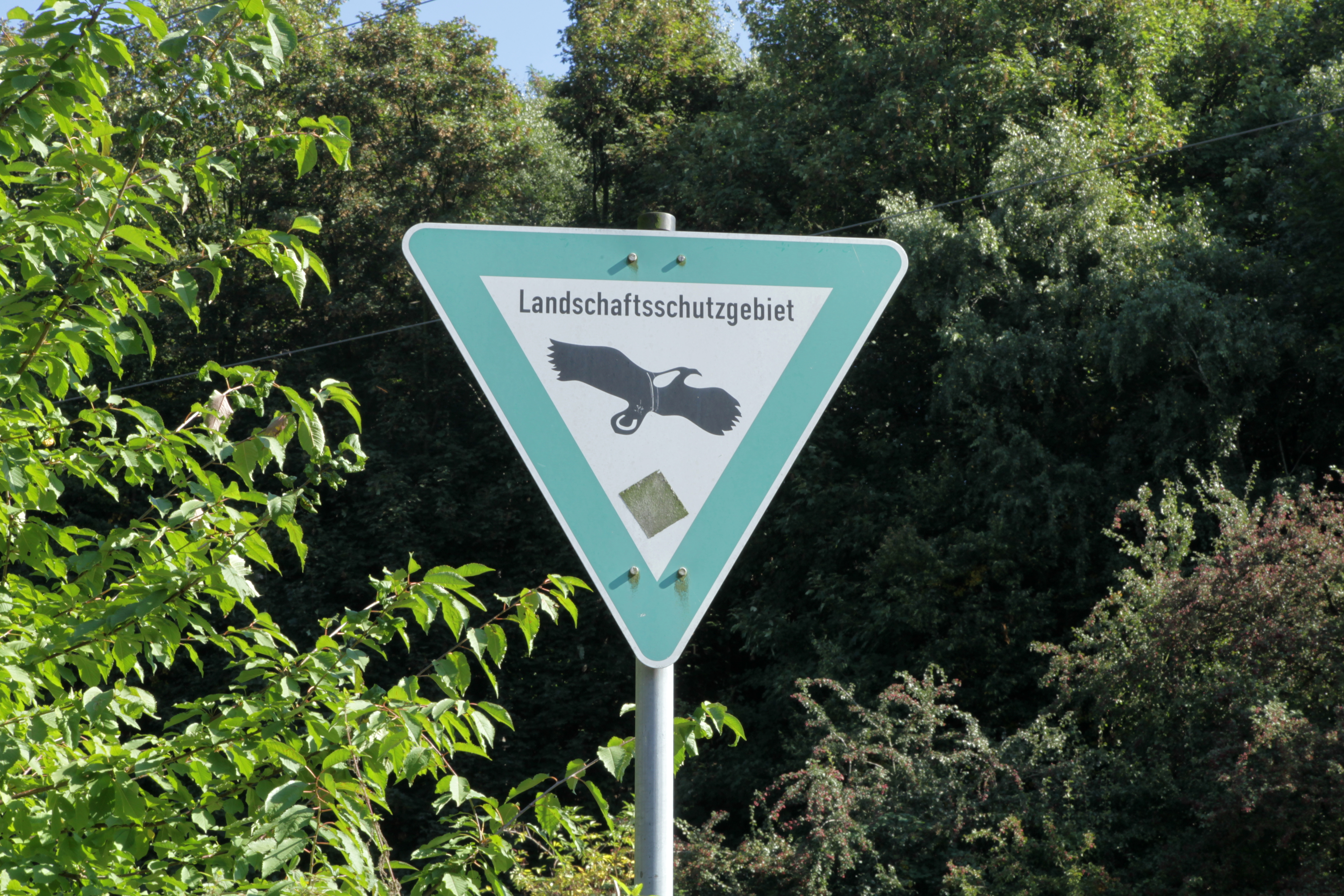 Halde Rheinelbe Süd in Gelsenkirchen, Schild zum Landschaftsschutzgebiet „Östlich und westlich der Hattinger Straße“ (die Halde gehört nicht dazu)